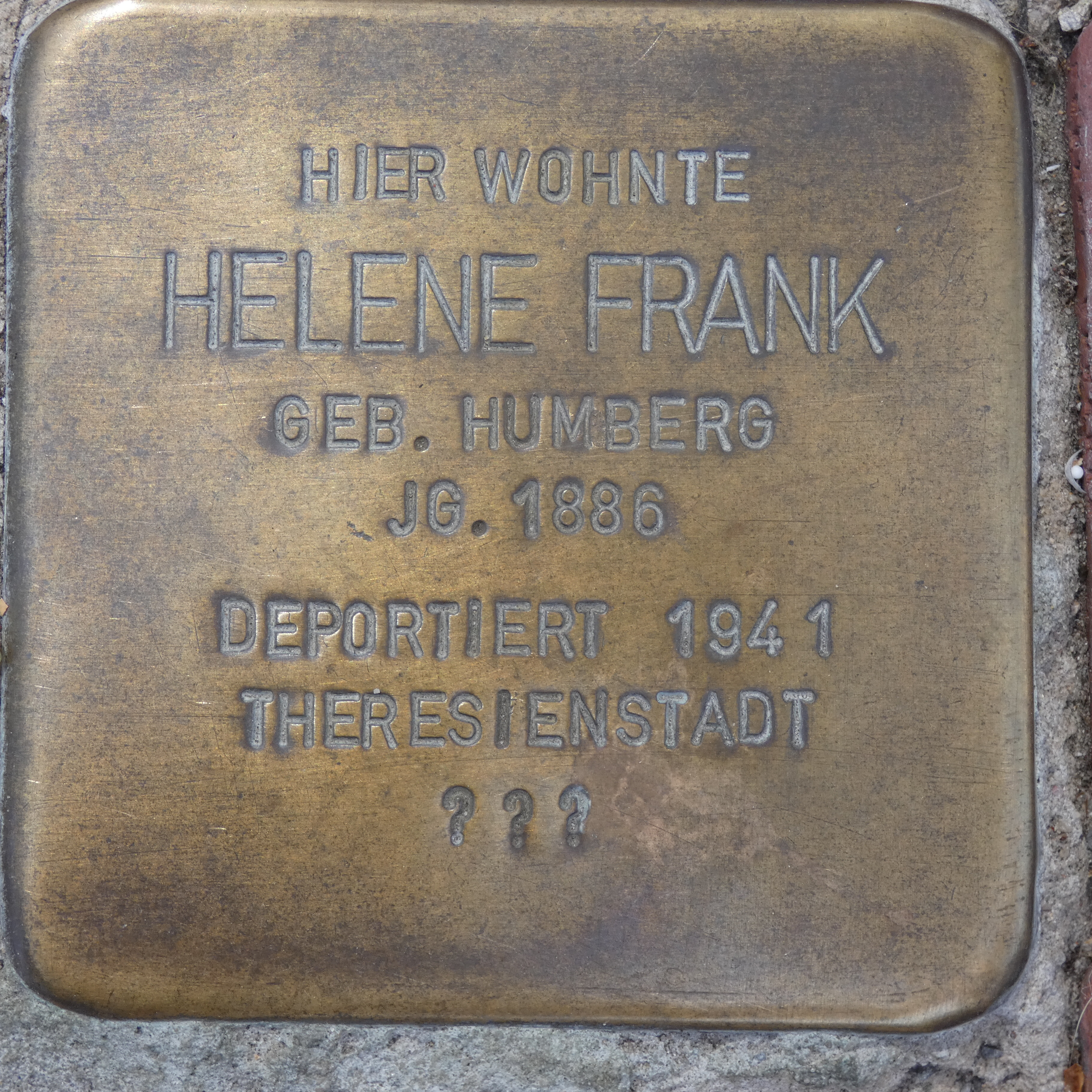 Hier wohnte Helene Frank, geb. Humberg, Jg. 1886, deportiert 1941 Theresienstadt, ???